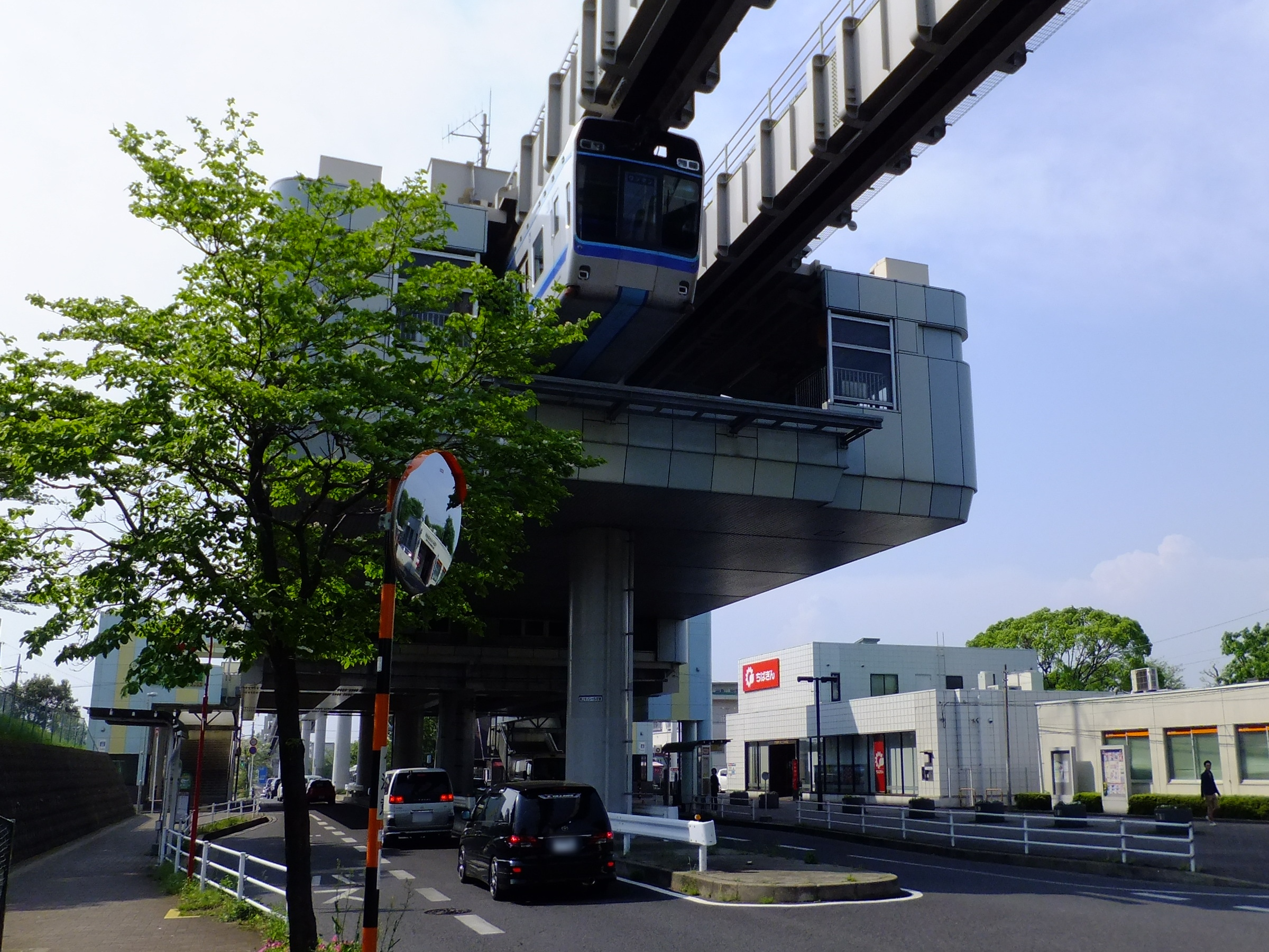 千葉都市モノレールみつわ台駅